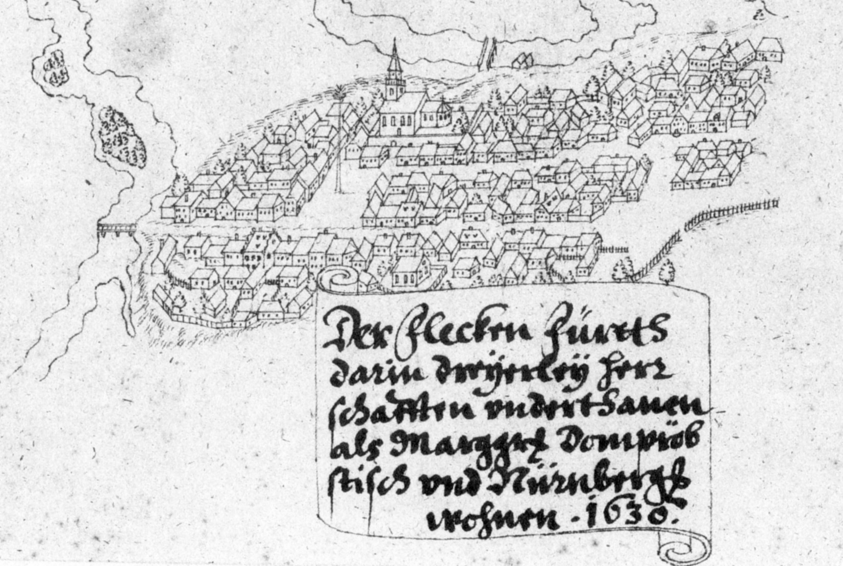 "Der Flecken Fürth darin dreyerley herrschaften underthanen als Margr. Dompröbstisch und Nürnberg wohnen 1630" (in etwa: der Flecken Fürth, in dem die Untertanen dreier Grundherren wohnen, nämlich markgräfliche, dompröbsteiliche und Nürnberger Bürger). Es handelt sich um die älteste Gesamtansicht Fürths. - Zeichnung, Bestand Germanisches Nationalmuseum Nürnberg